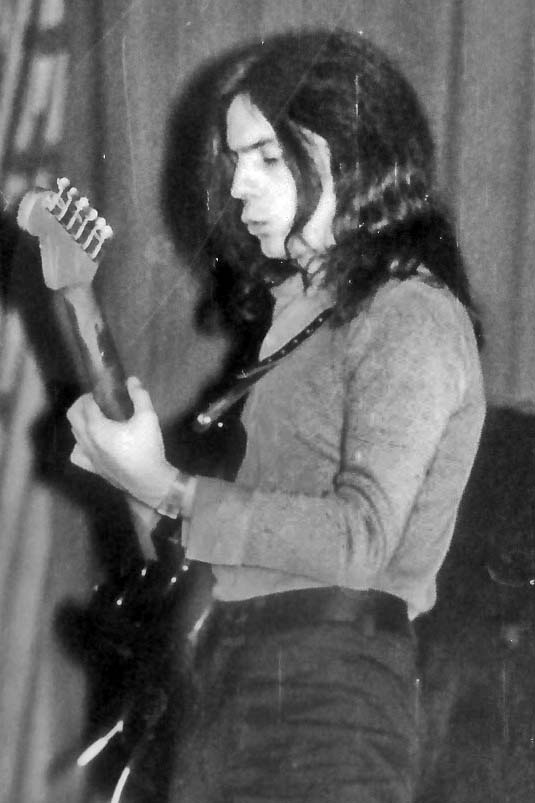 ARRELS. Manel T. Pujol